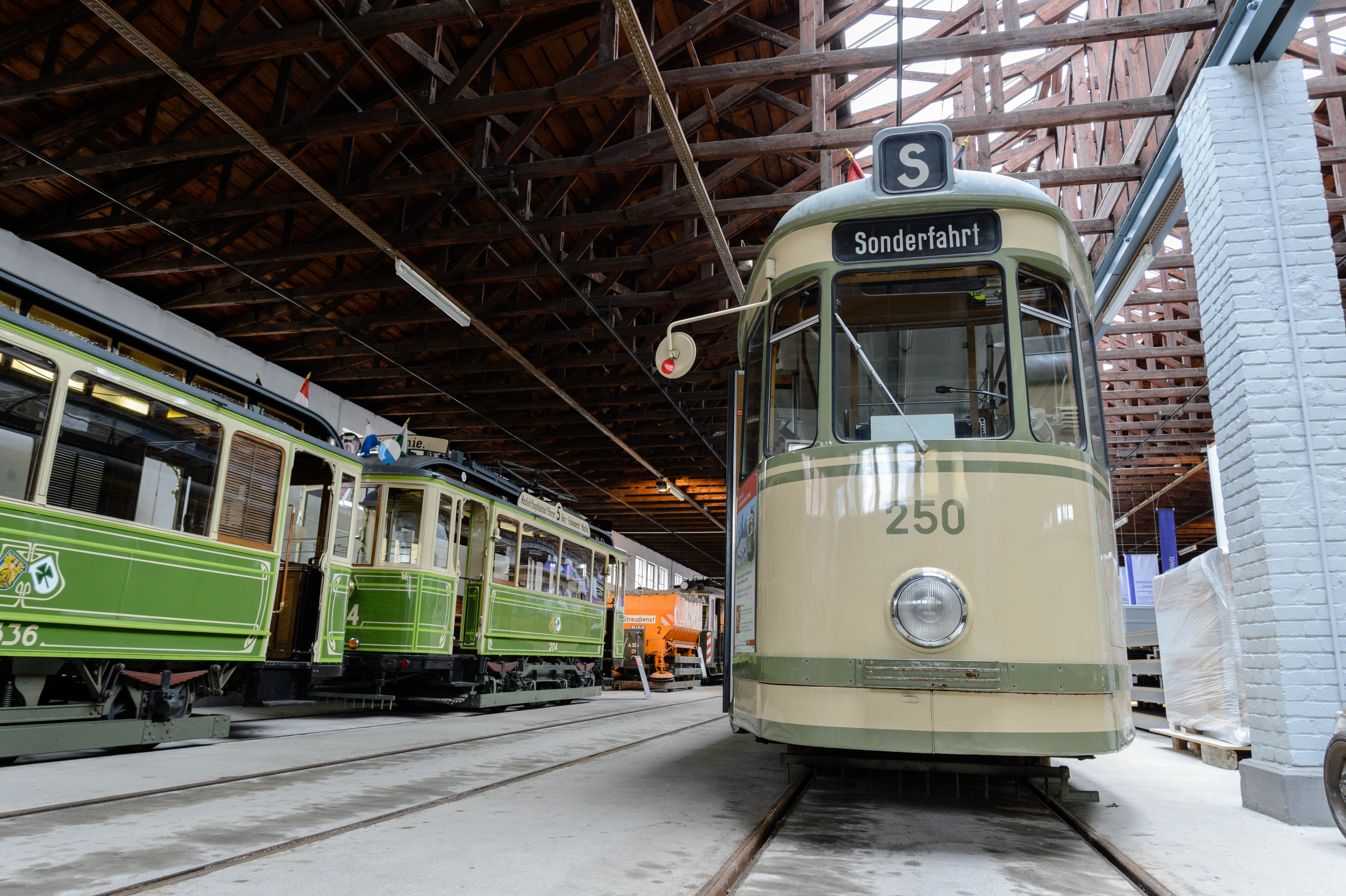 Im historischen Straßenbahndepot in St. Peter in Nürnberg.